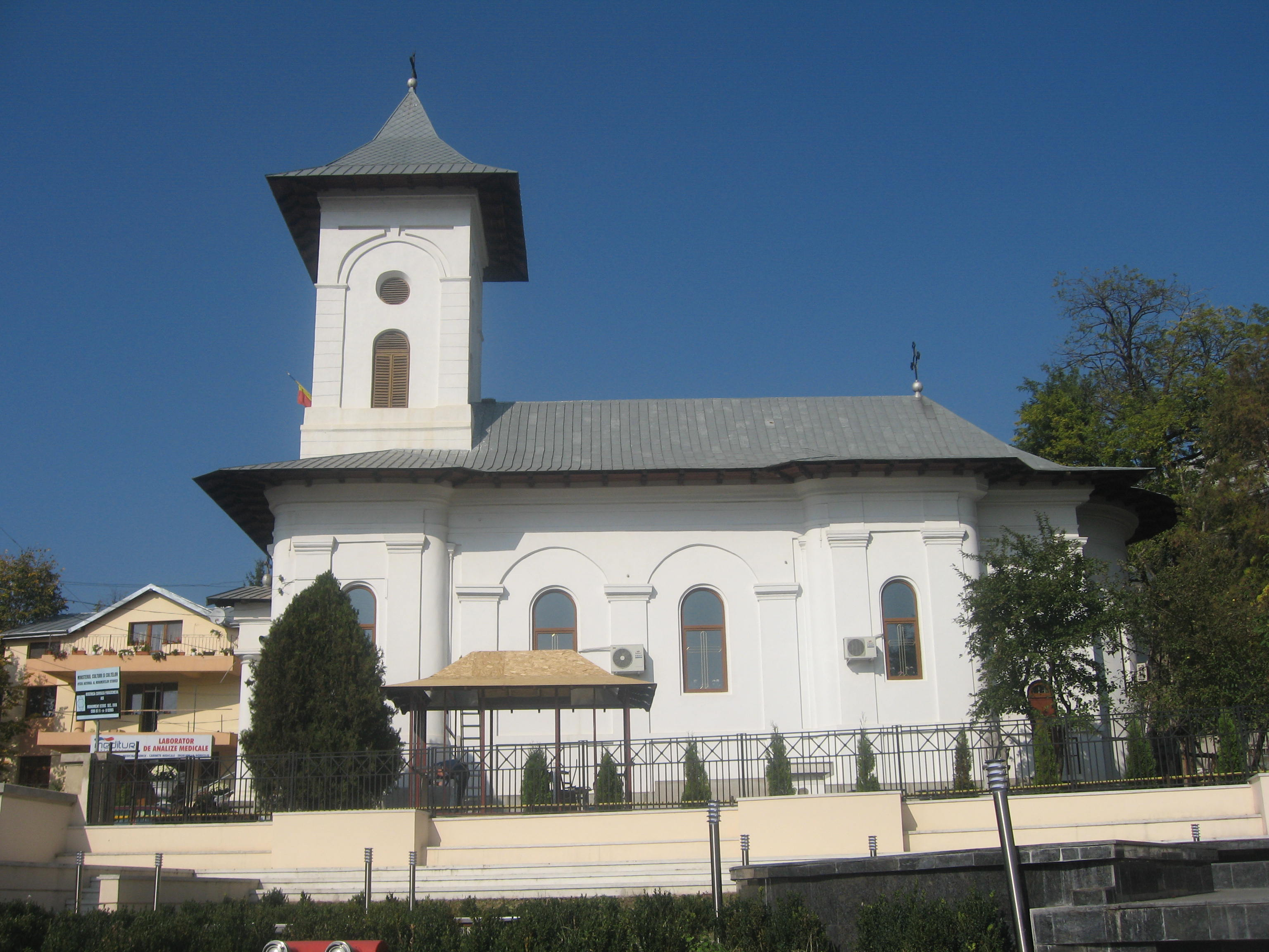 Biserica Cuvioasa Parascheva din Iasi